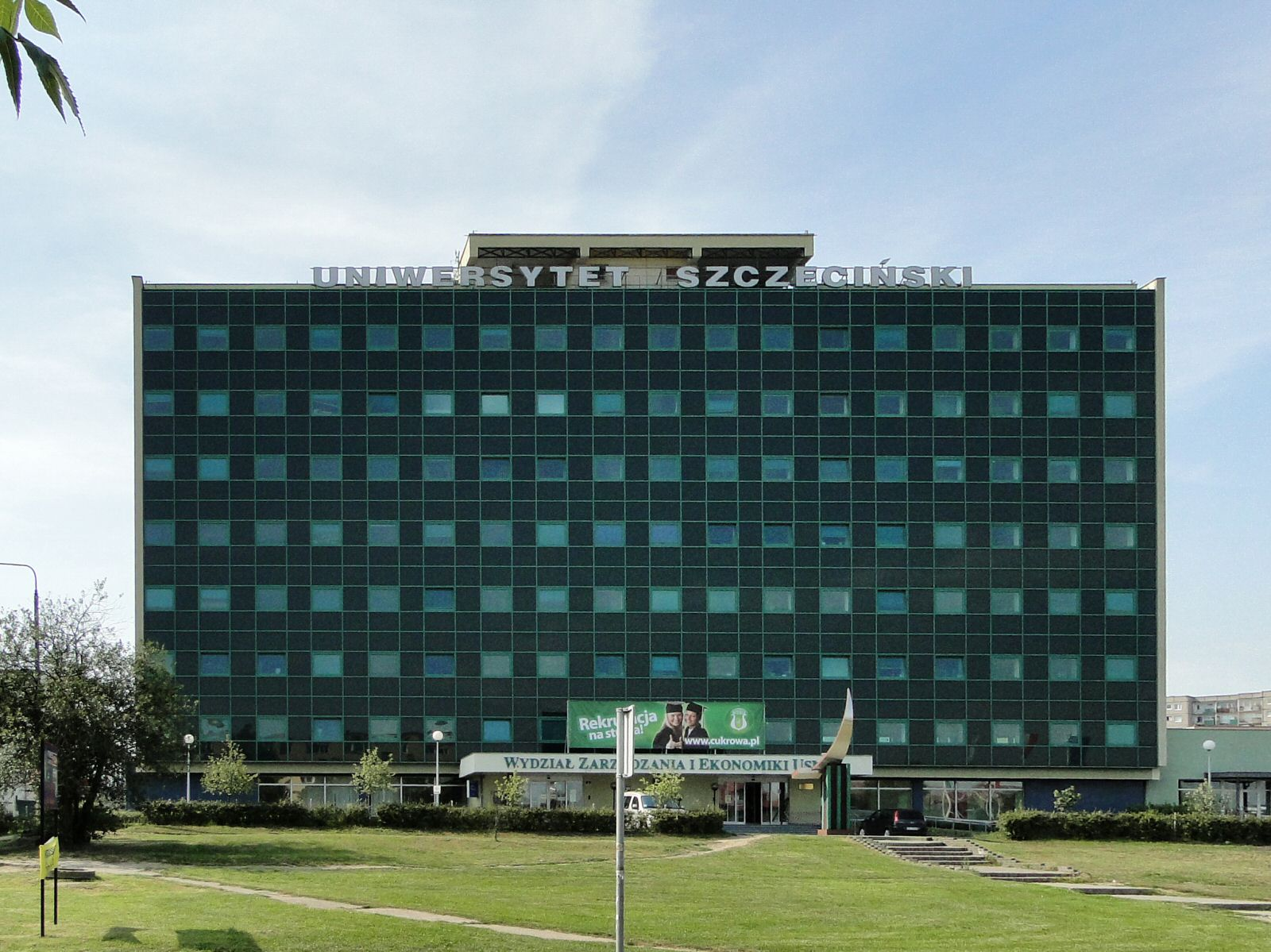 Siedziba Wydziału Zarządzania i Ekonomiki Usług Uniwersytetu Szczecińskiego przy ul. Cukrowej 8 w Szczecinie.